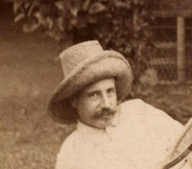 Paul Brunat (1840 - 1908) vers 1870